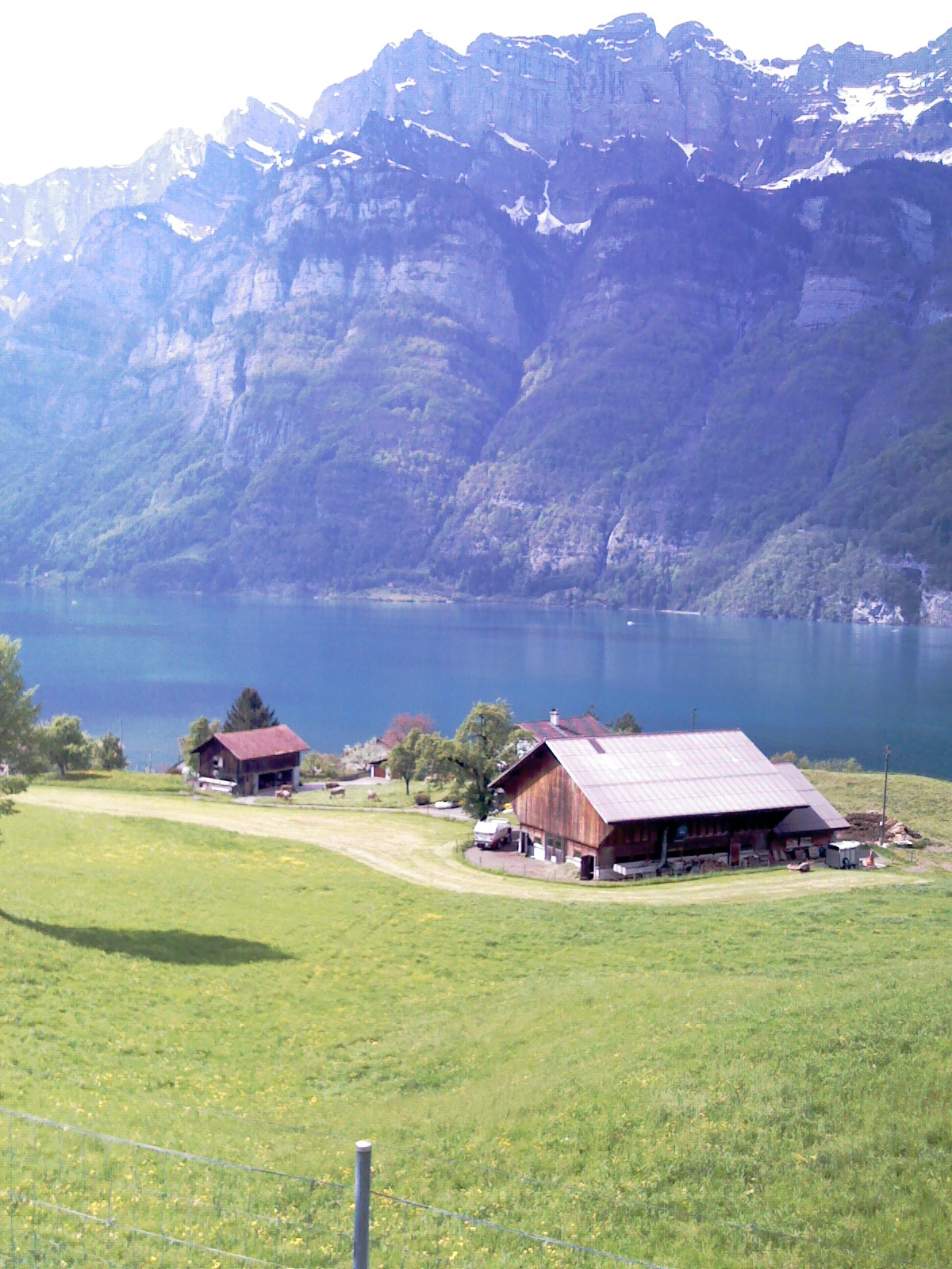 Bergsboden (Unterterzen, Quarten), Sarganserland, Switzerland, view to Lake Walen - Bergsboden (municipo Unterterzen, komunumo Quarten) en Sarganslando, Svislando, rigardo al Valenlago